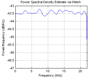 White noise PSD estimate via Welch